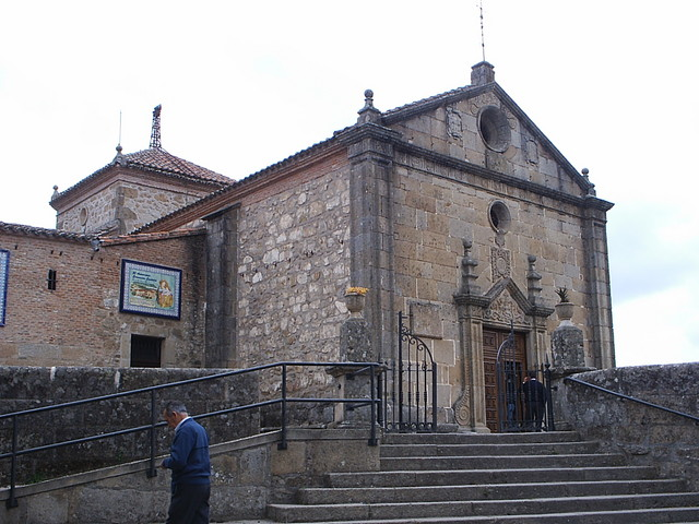 Imagen del Santuario de la Virgen del Puerto, en Plasencia, Provincia de Cáceres, Extremadura. Imagen obtenida por Antonio Cordero ( que la cede libremente para la Wikipedia. Categoría:España (imagen) Category:Plasencia